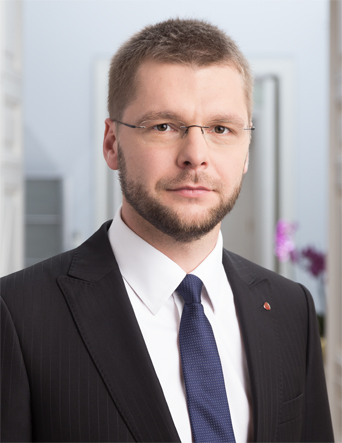 Jevgeni Ossinovski 2015. aasta septembris